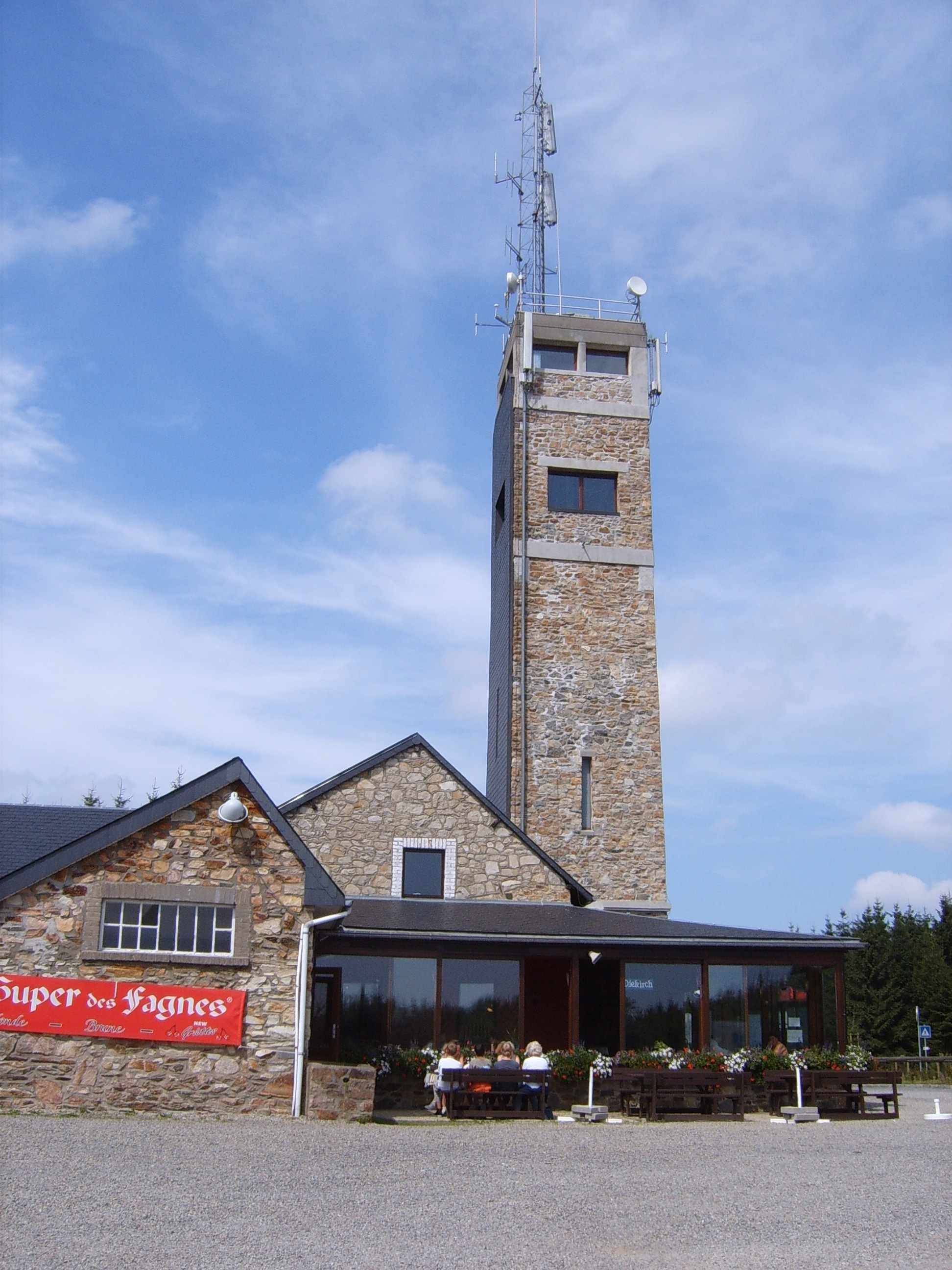 Signal de Botrange, Hautes Fagnes. Personal picture, I sit it in public domain.